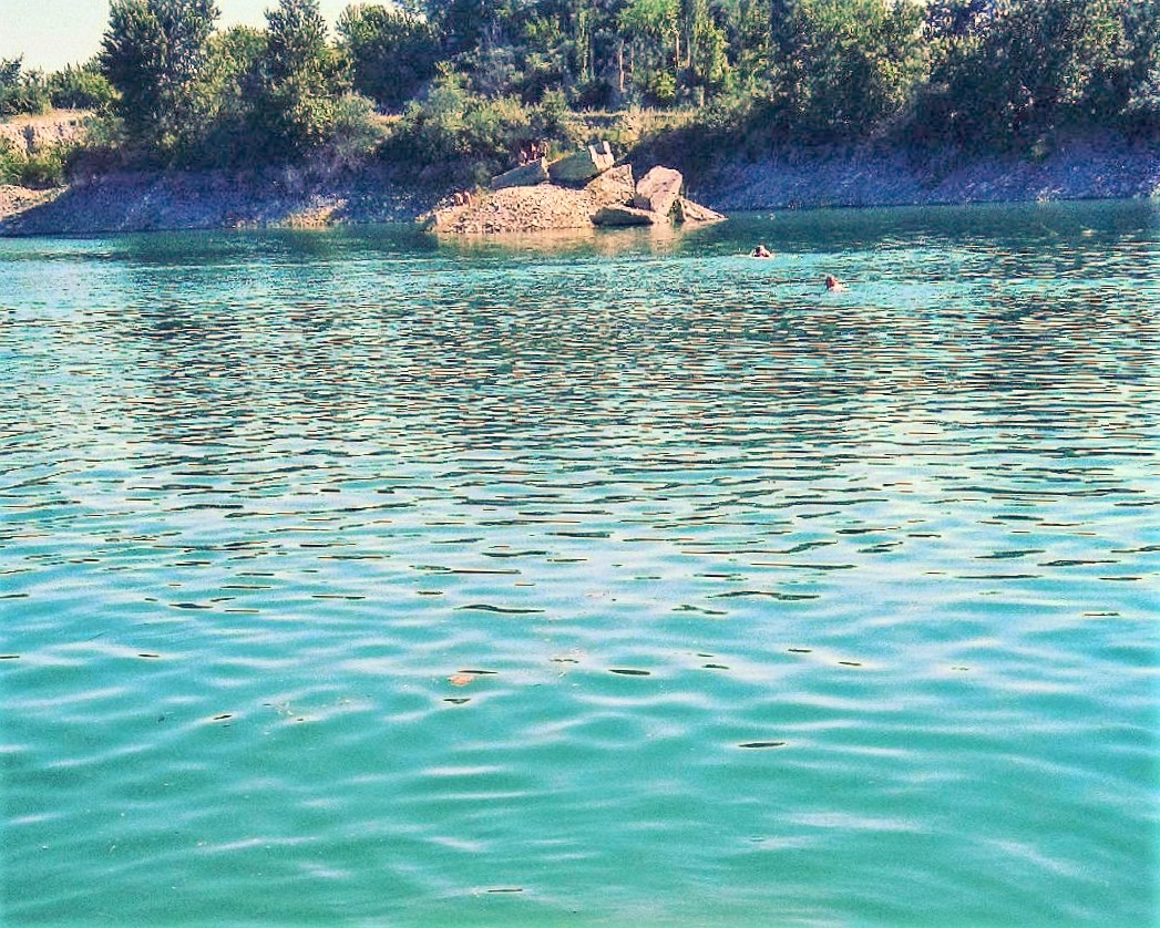 На одном из Старо-Черекских озёр